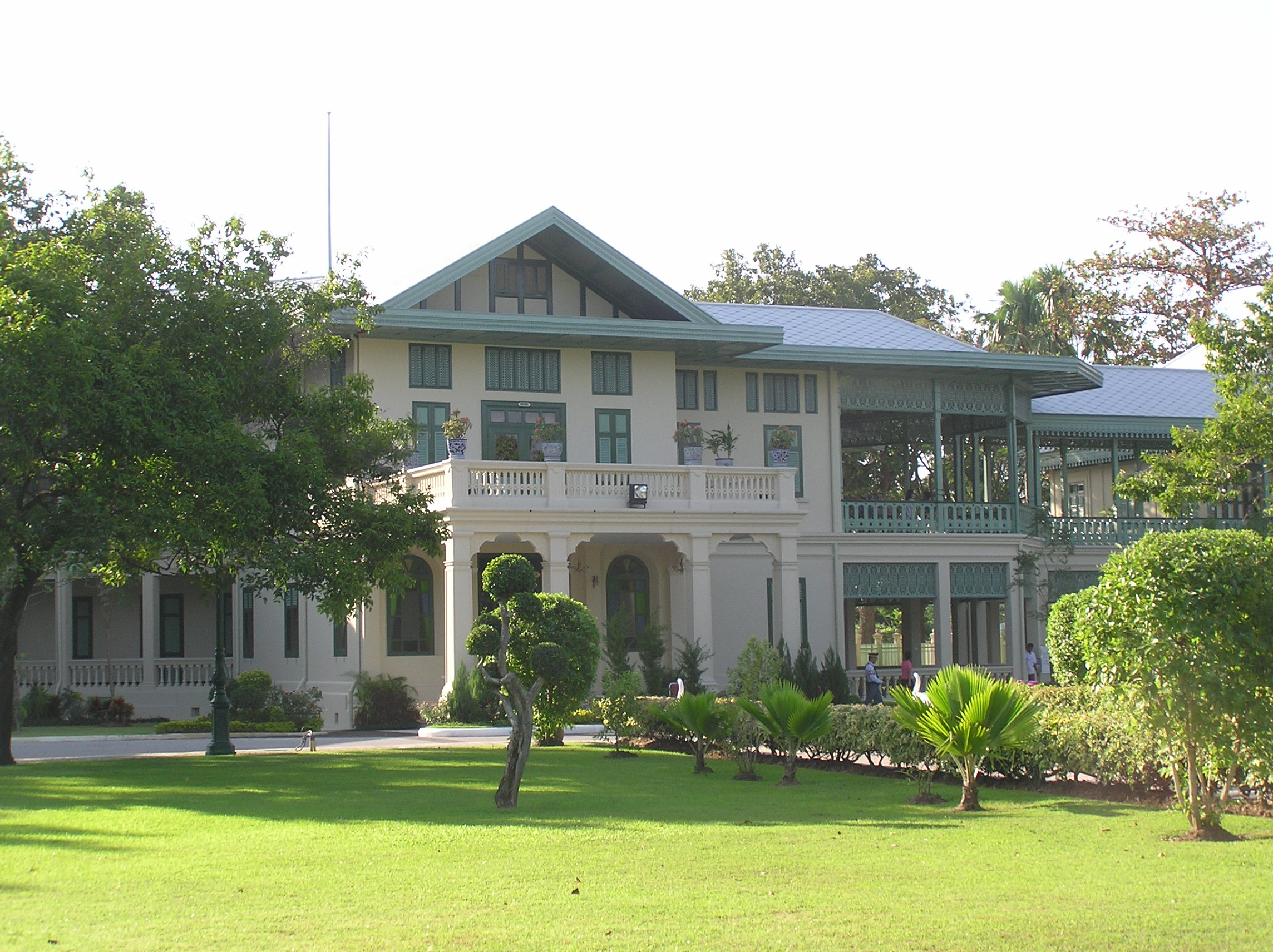 Phiman Pathom Residence, one of the residence in Sanam Chan Palace Nakhon Pathom พระที่นั่งพิมานปฐม ใน พระราชวังสนามจันทร์